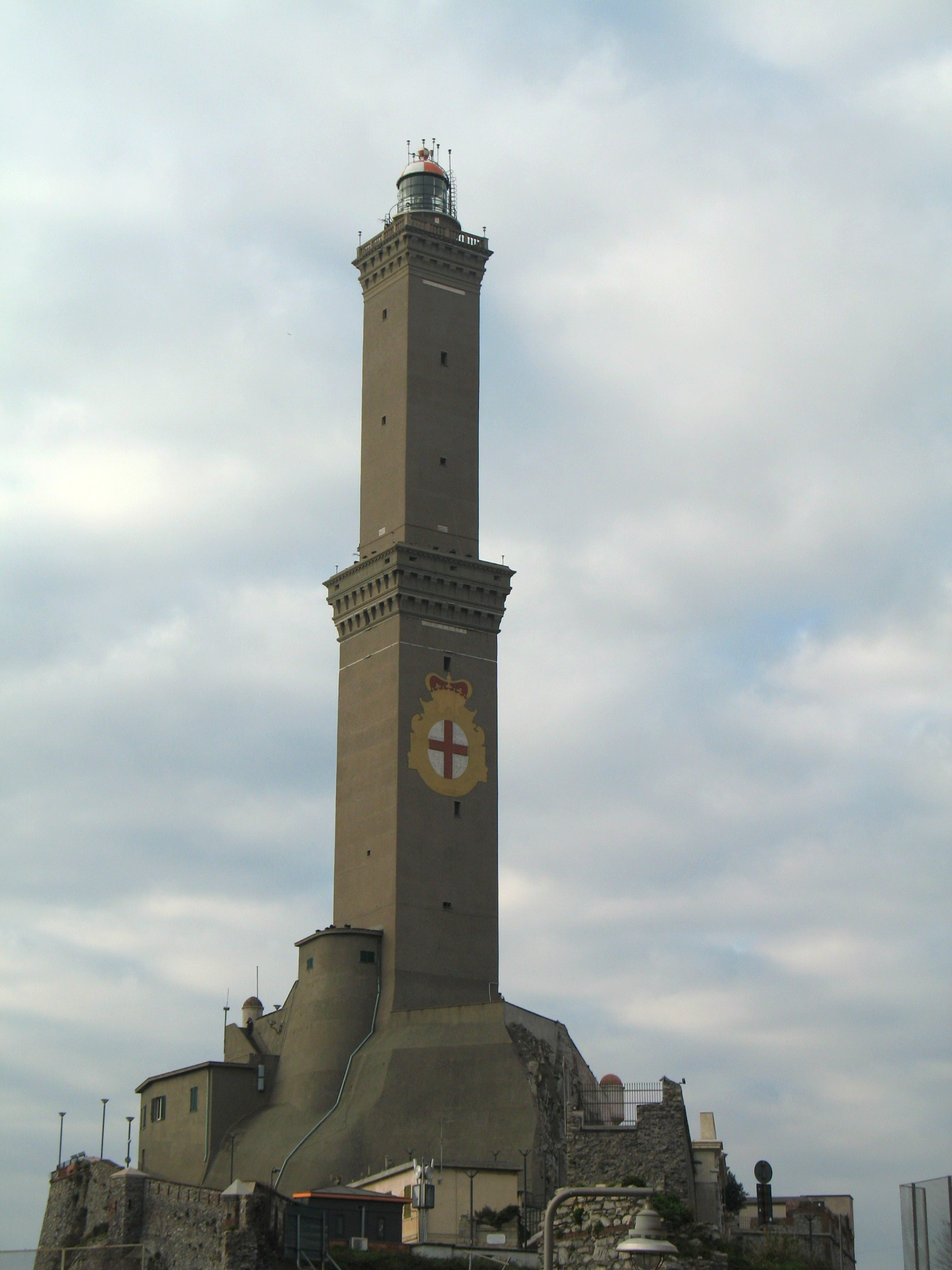 Immagine dalla Lanterna di Genova (passeggiata, fortificazioni, museo della Lanterna) Lanterna - prospetto